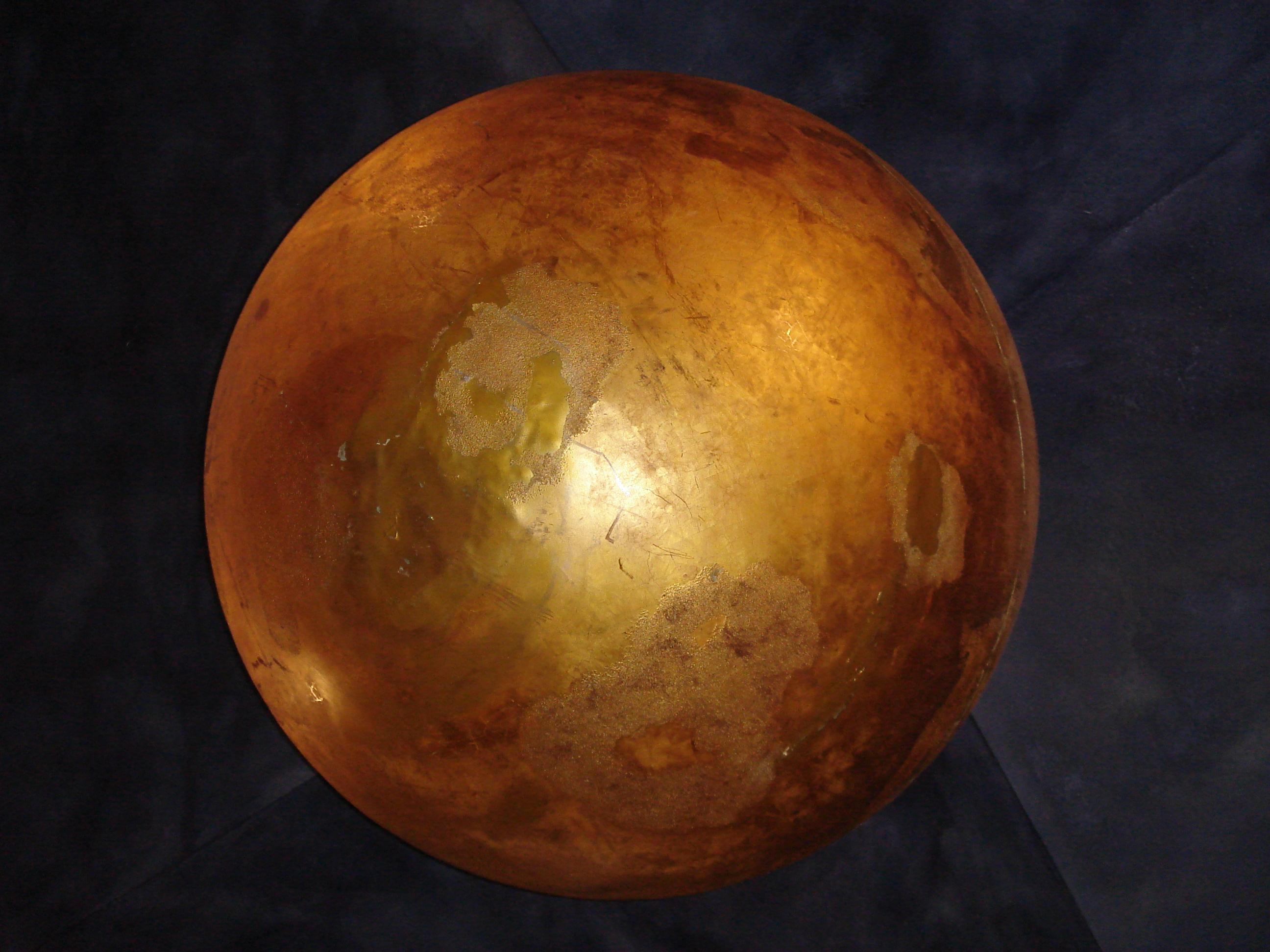 Planetenmodell Hagen, vergoldete Sonnenkugel im Ratskeller